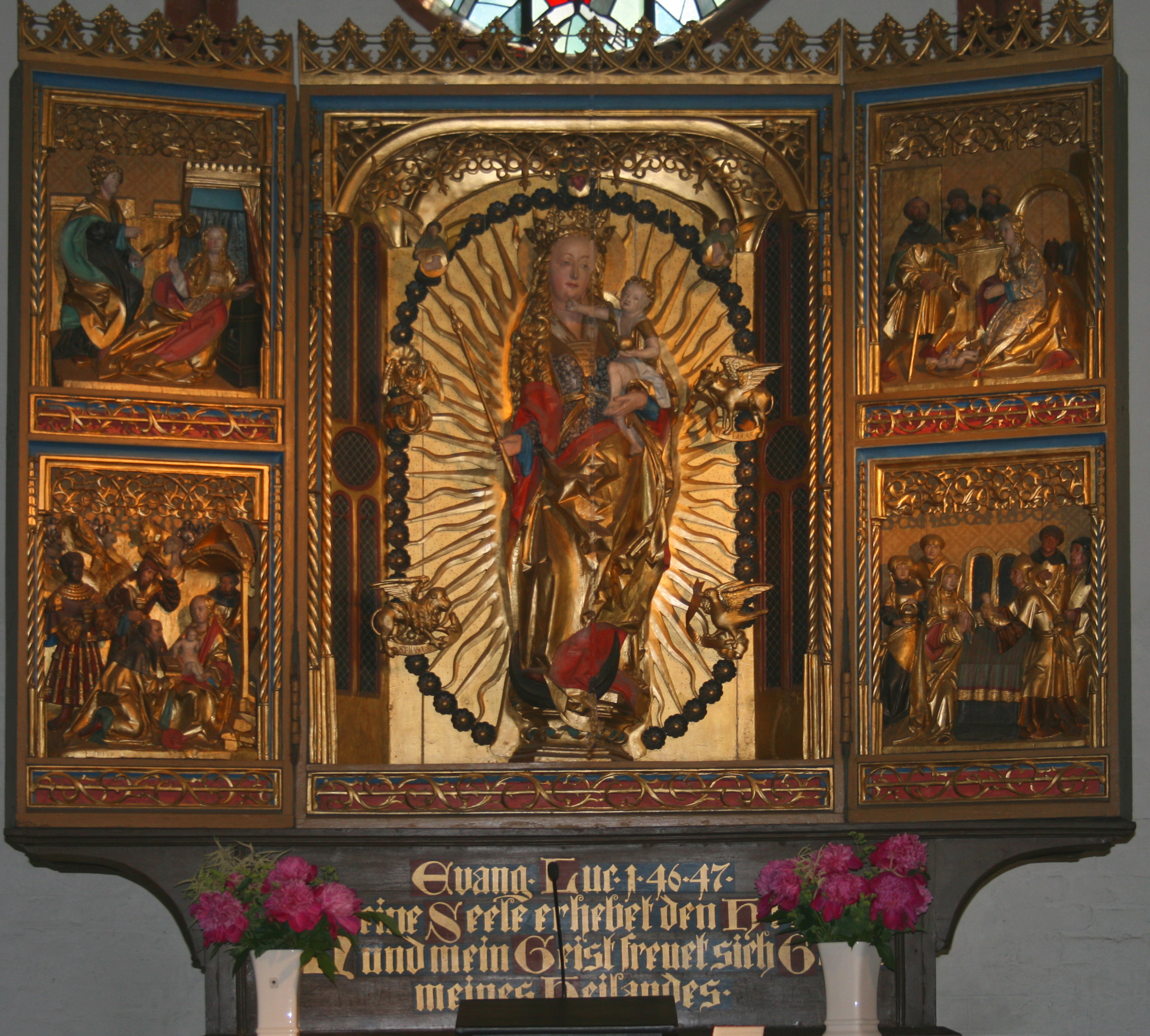 Altar der der St.-Jürgen-Kirche in Gettorf (Schleswig-Holstein) ~1500